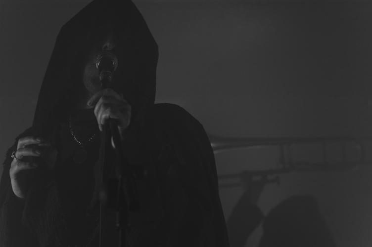 El vocalista húngaro Attila Csihar actuando con Sunn O))) en el festival Sinsal de 2010.